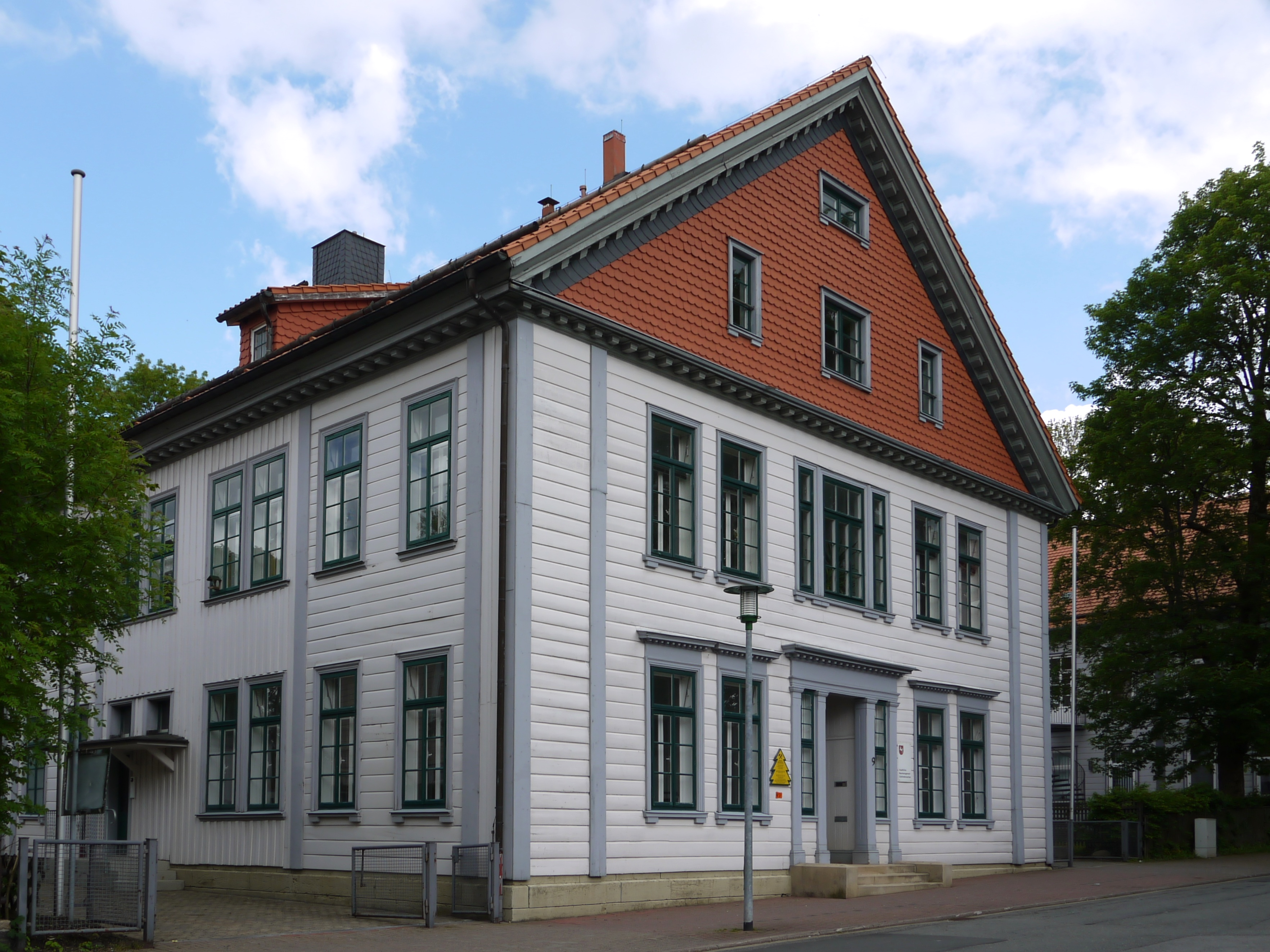 Ehemaliges Großes Lyzeum von Clausthal (1845 bis 1905), danach von 1905 bis 1925 Lyzeum für Mädchen. Hier legte Robert Koch 1862 sein Abitur ab. Heute "Staatliches Baumanagement Südniedersachsen".